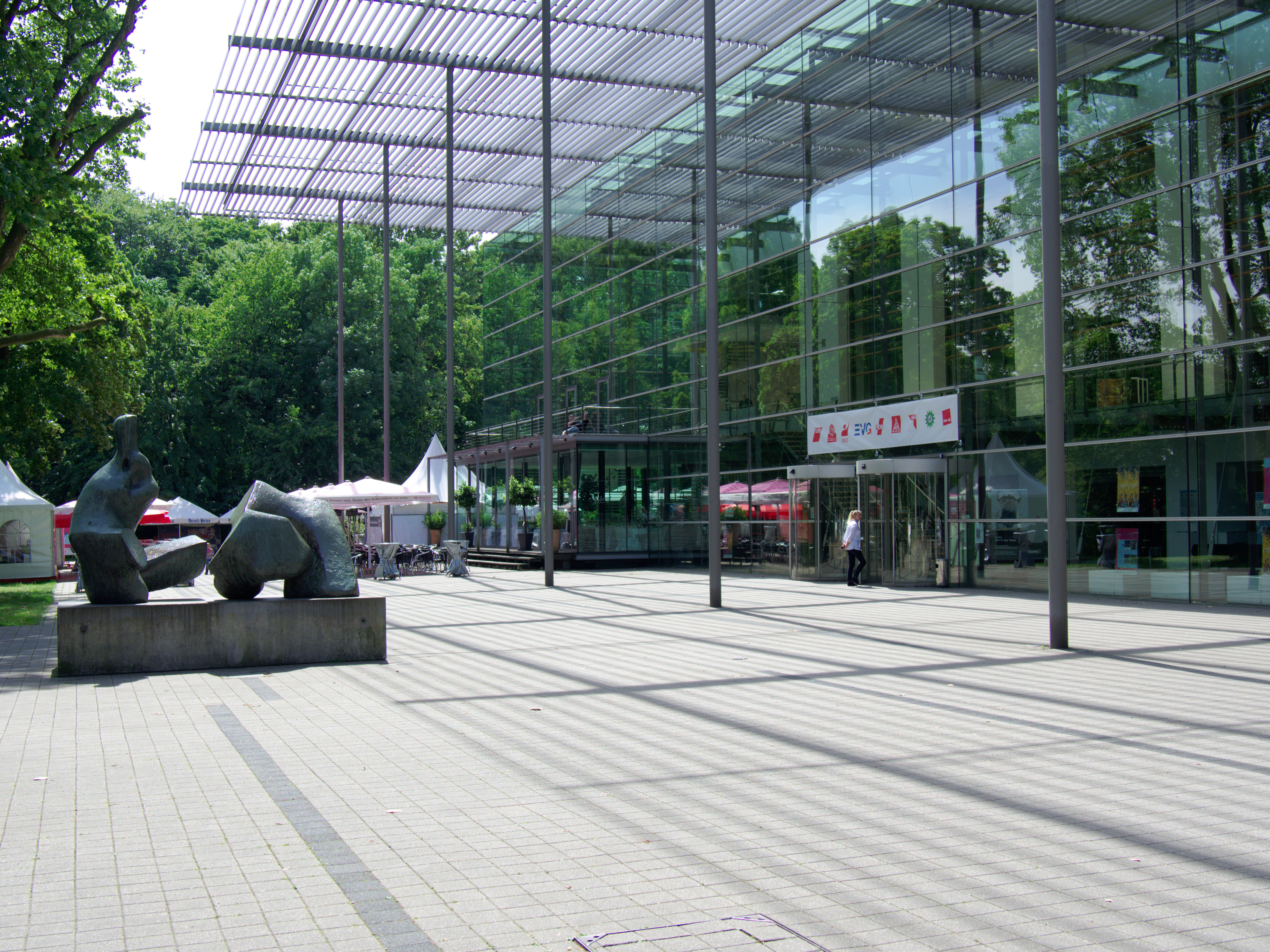 Die Bronzefigur Two Piece Reclining Figure No. 5 von Henry Moore als Große Liegende Nr. 5 aus dem Jahr 1964/65 vor dem Ruhrfestspielhaus in Recklinghausen